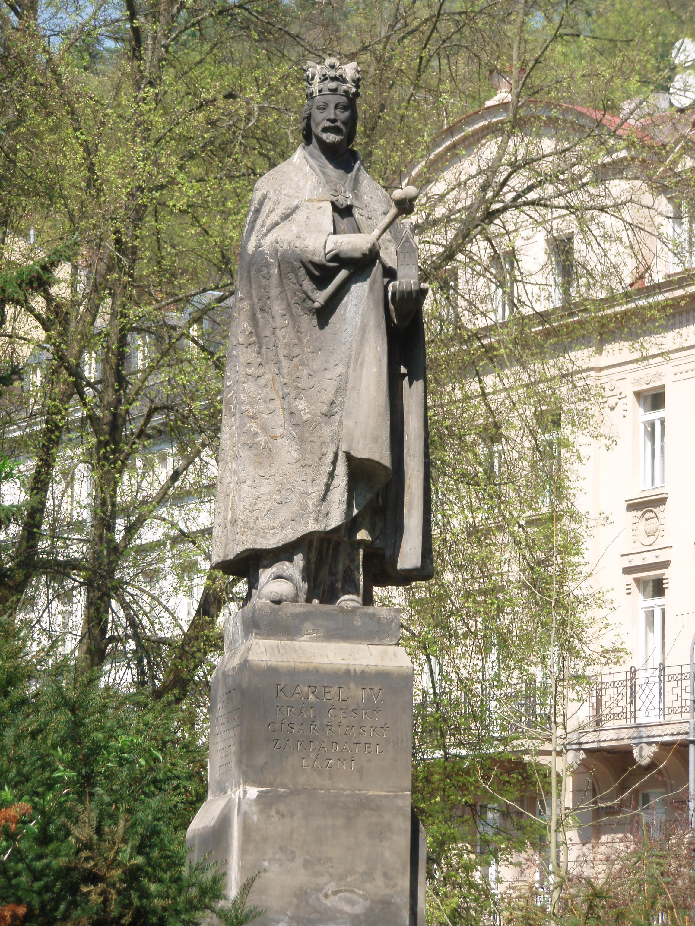 Karel IV